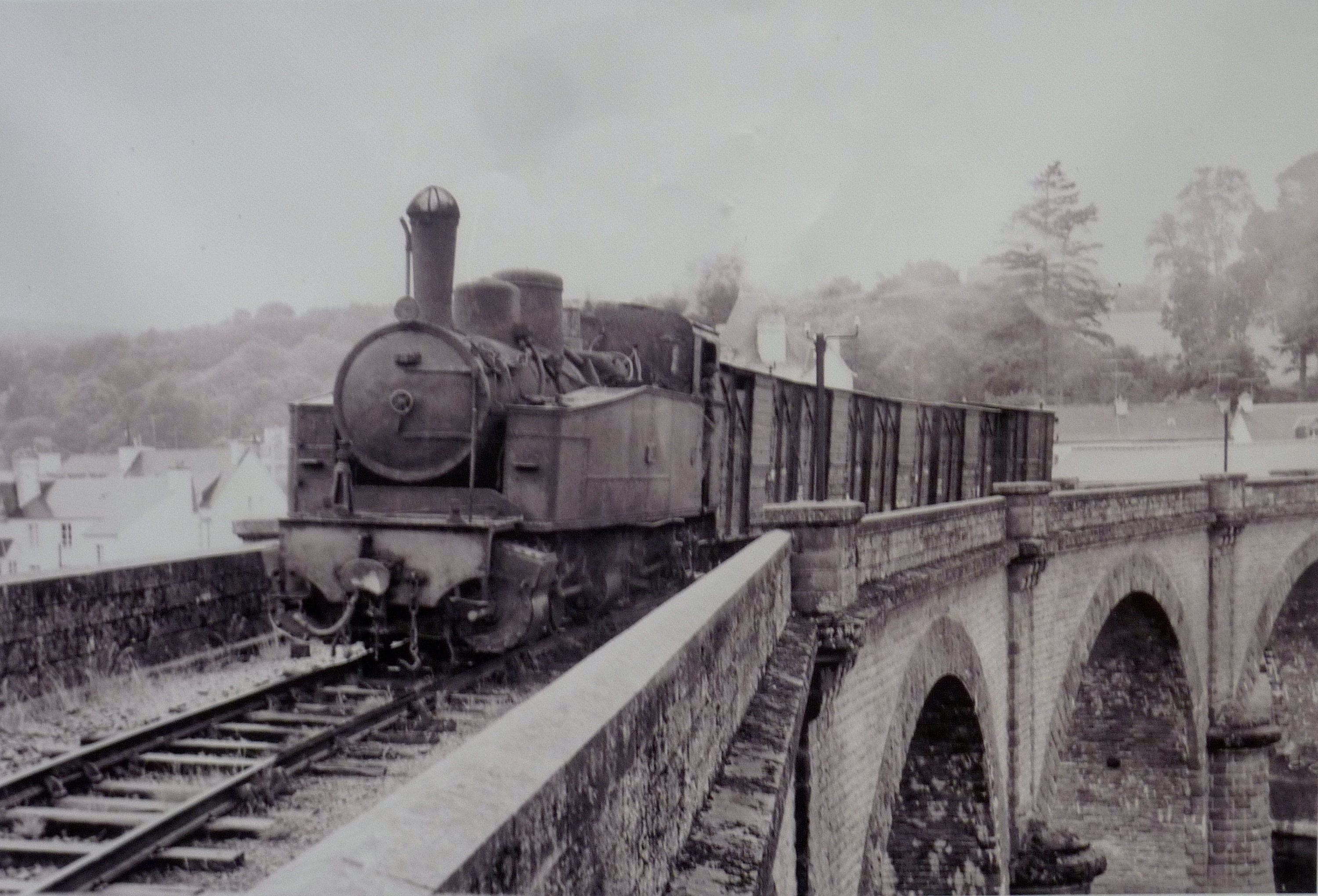 Un train du "Réseau breton" à voie métrique passant sur le viaduc en courbe franchissant l'Aulne à Châteaulin dans les années 60.siècle